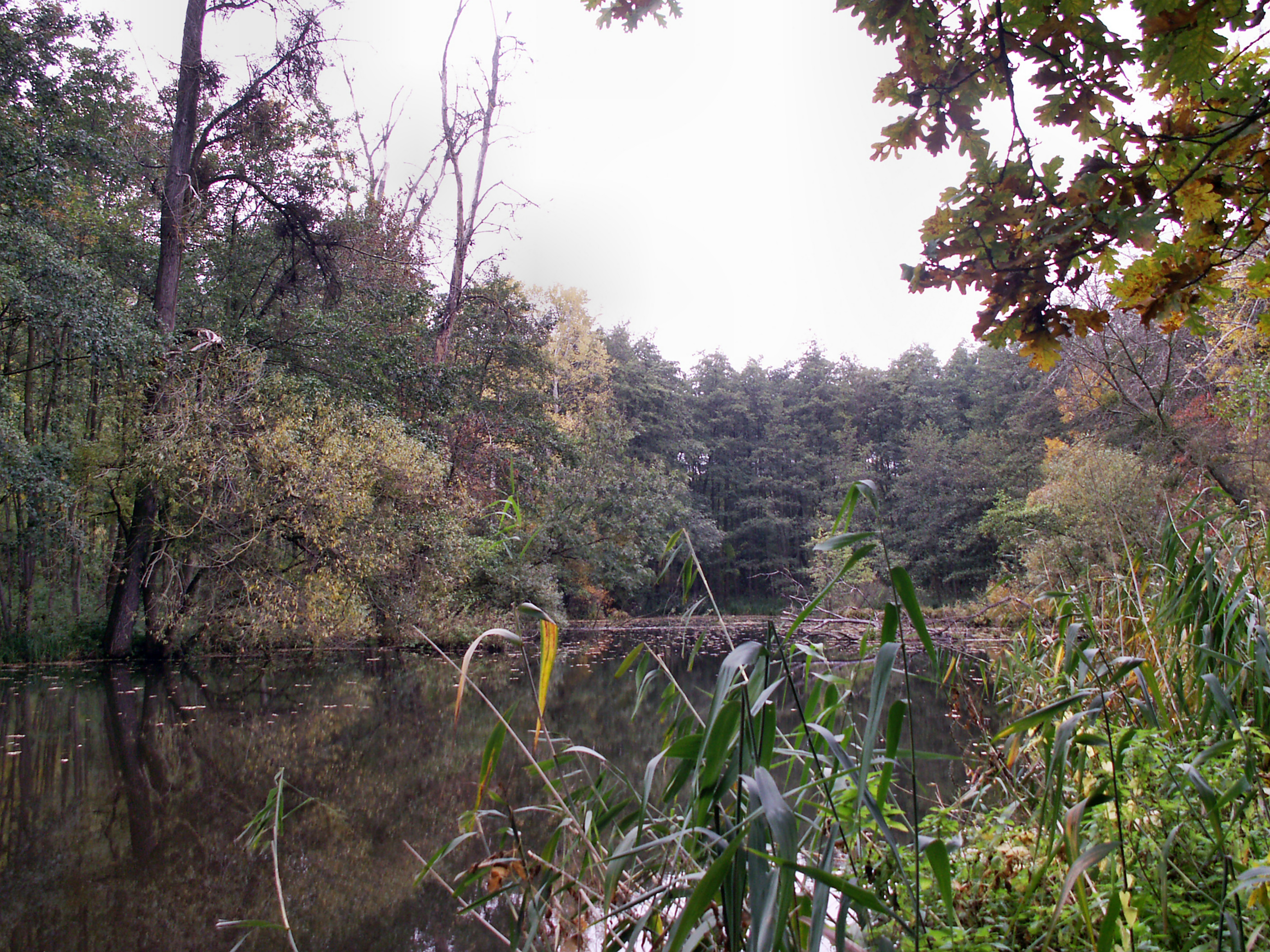 Přírodní rezervace č. 1451 Plačkův les a říčka Šatava, okres Brno-venkov